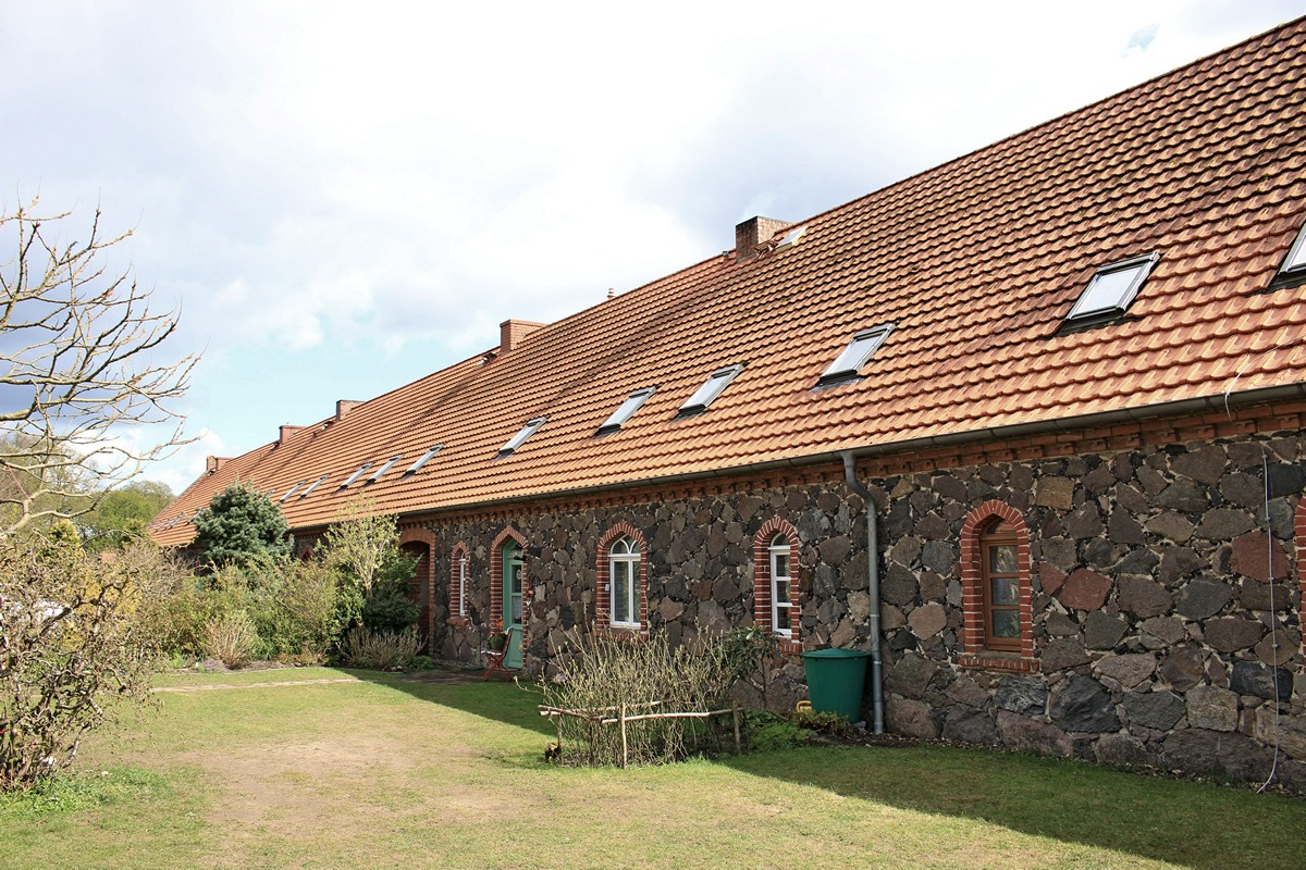 Mittelalterliches Langhaus in Hallalit bei Vollrathsruhe in Mecklenburg (104 m lang)